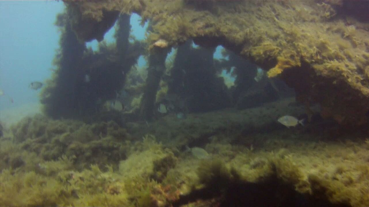 HMS Maori